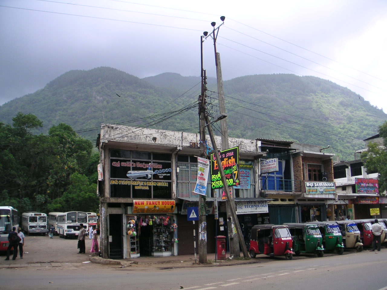 Matale, Sri Lanka. Photo: Soman